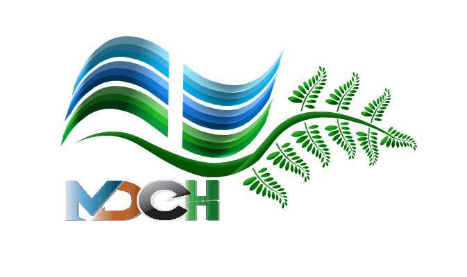 Logo Rasmi Majlis Daerah Cameron Highlands